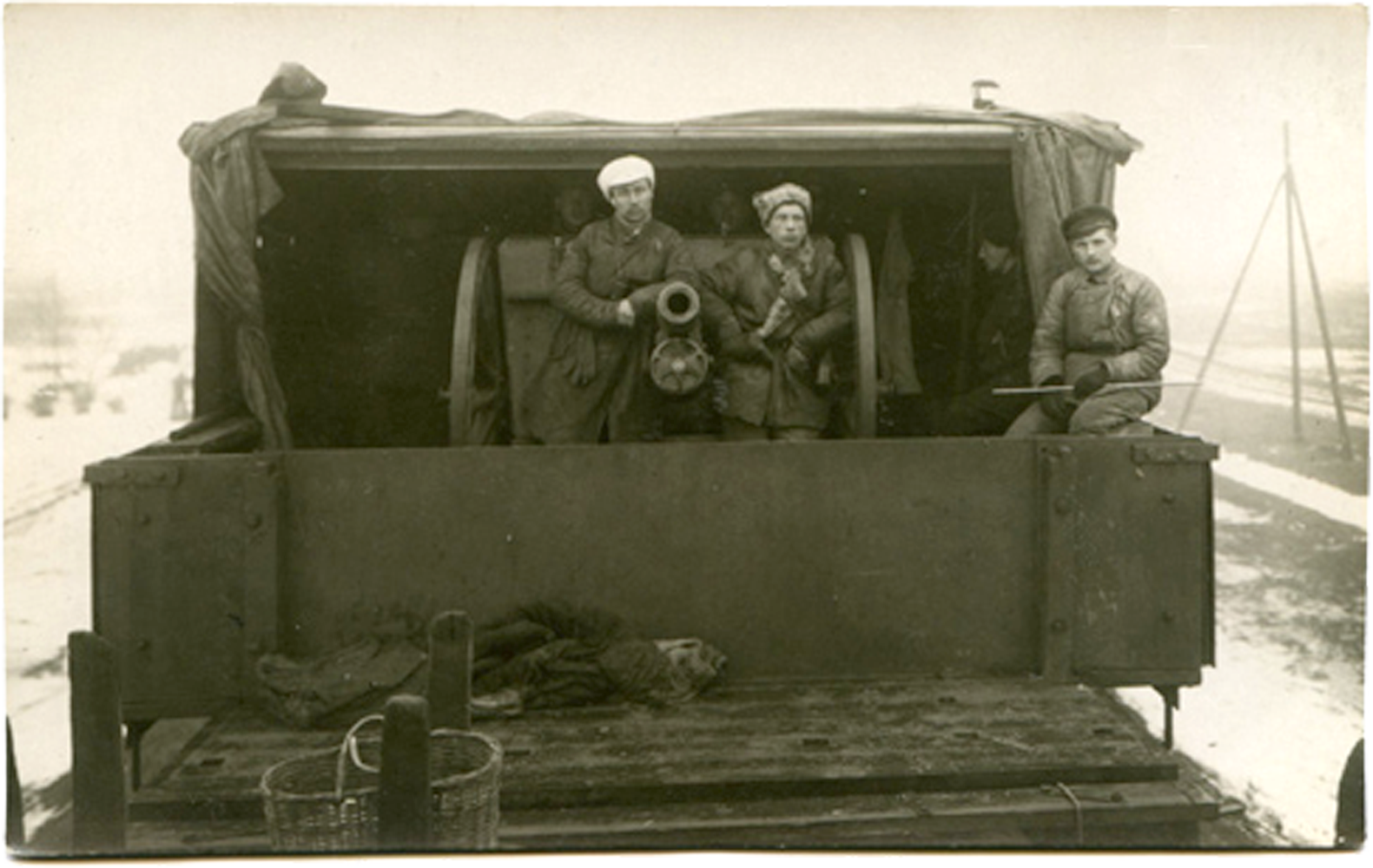 Laiarööpmelise soomusrongi nr 1 ülem kapten Anton Irv, tema abi leitnant Eduard Neps ja rongi suurtükipatarei ülem leitnant Reinhold Sabolotnõi laiarööpmelise soomusrongi nr 1 suurtükiplatvormil (jaanuar 1919).